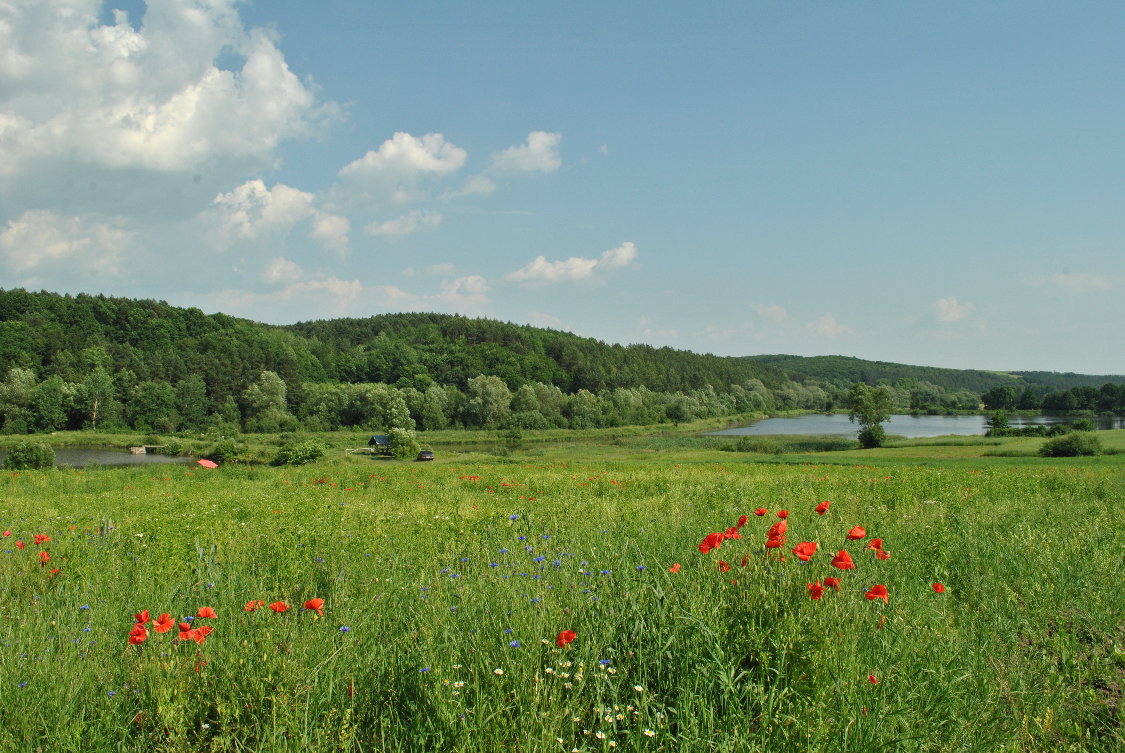 Загальнозоологічний заказник «Межеліски», поблизу сіл Бариш і Зубрець Бучацького району в лісовому урочищі «Межеліски» у кварталі 17 Золотопотіцького лісництва.